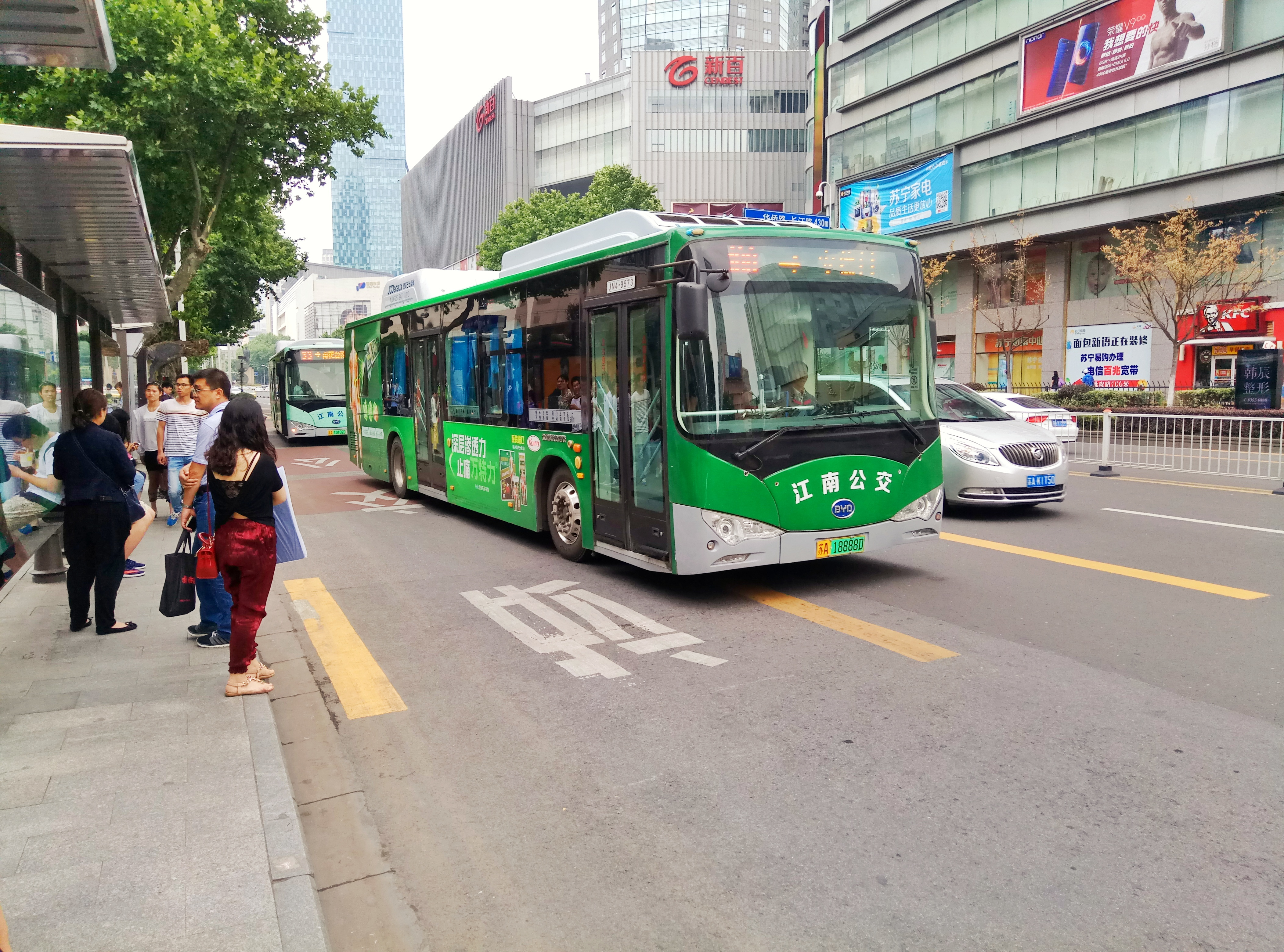 南京公交100路使用的比亚迪K9F纯电动客车